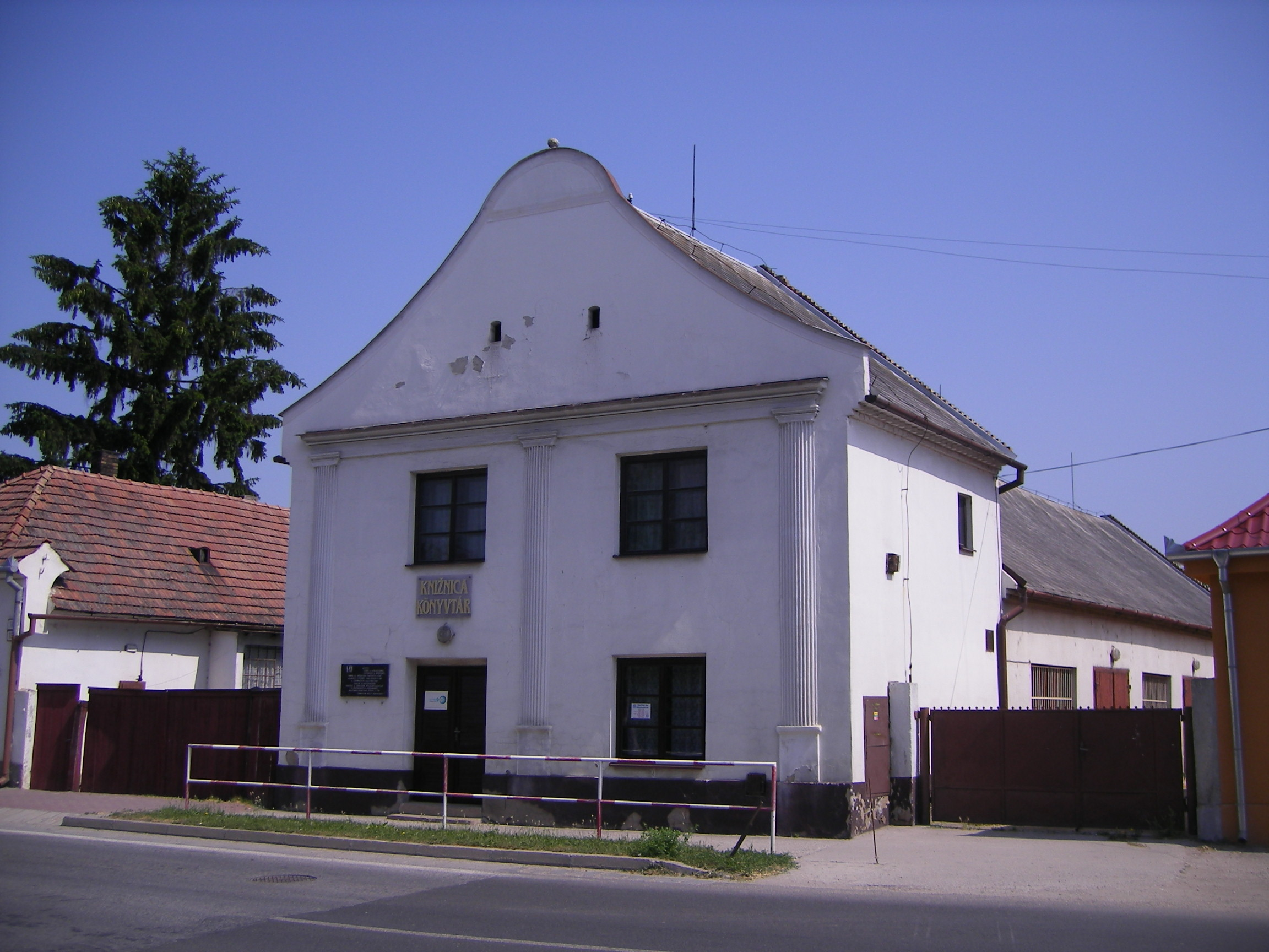 Nagymegyer - könyvtár (Komáromi utca)